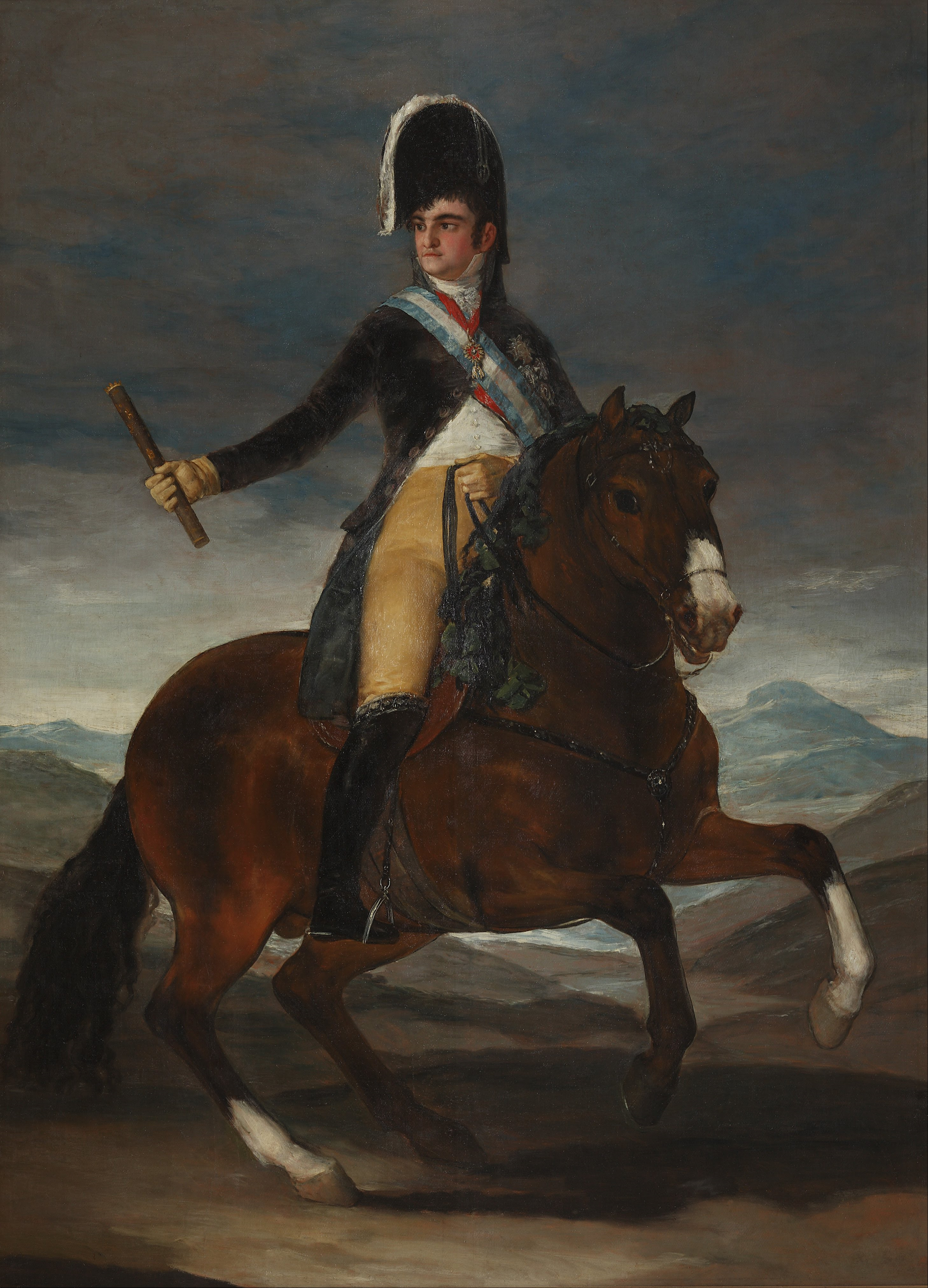 Retrato ecuestre del rey Fernando VII de España (1784-1833), que fue hijo del rey Carlos IV de España.